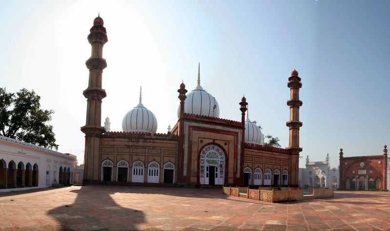 A.M.U. Masjid